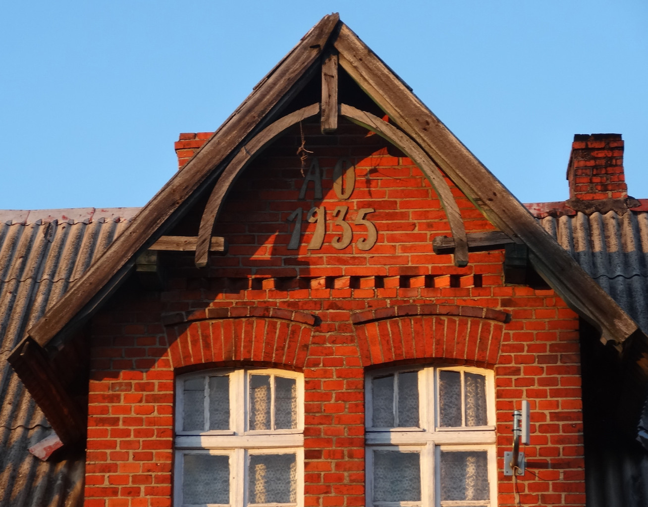 Brzoza koło Bydgoszczy, gmina Nowa Wieś Wielka, powiat bydgoski